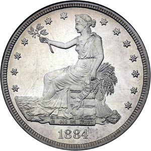 1884 Trade Dollar Obverse